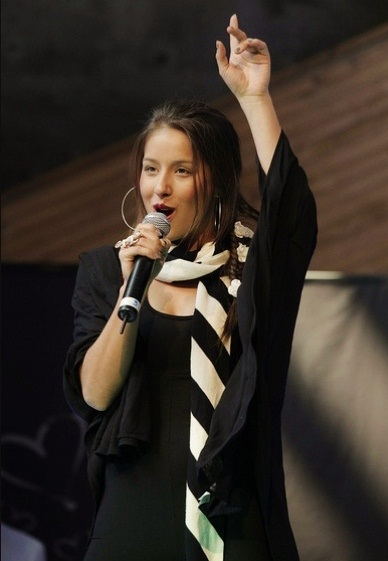 Denise Rosenthal cantante chilena en la presentación de la Teletón 2012.